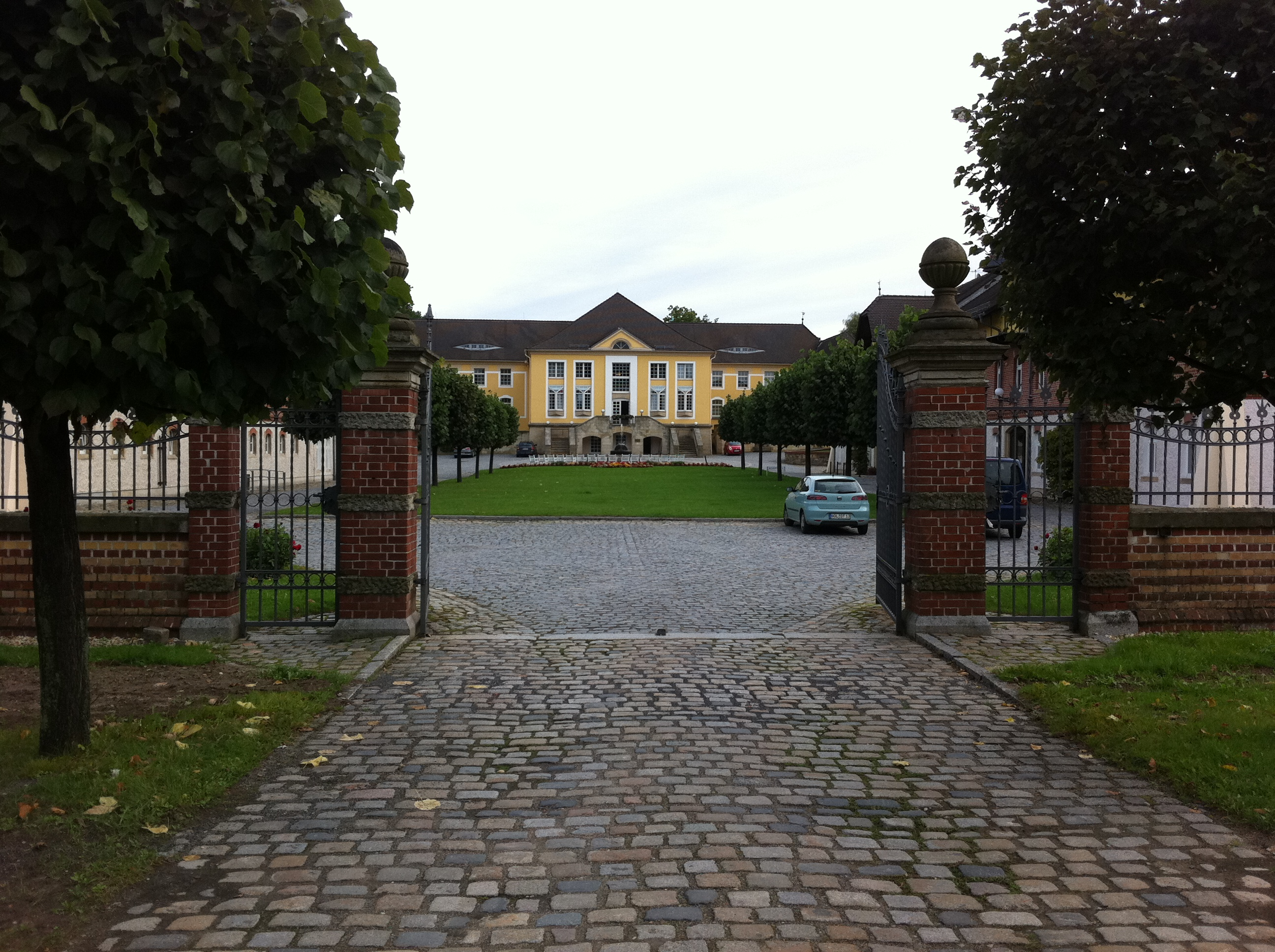 Bischof-Benno-Haus, Zufahrt über südliche Parkanlage mit Allee